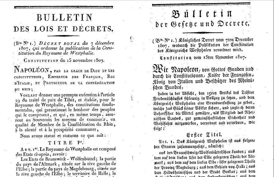 erste Seite des ersten Gesetzbulletins mit Beginn der eingerückten Verfassung des Königreichs (zweisprachig)